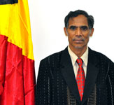 Mateus de Jesus, Abgeordneter aus Osttimor